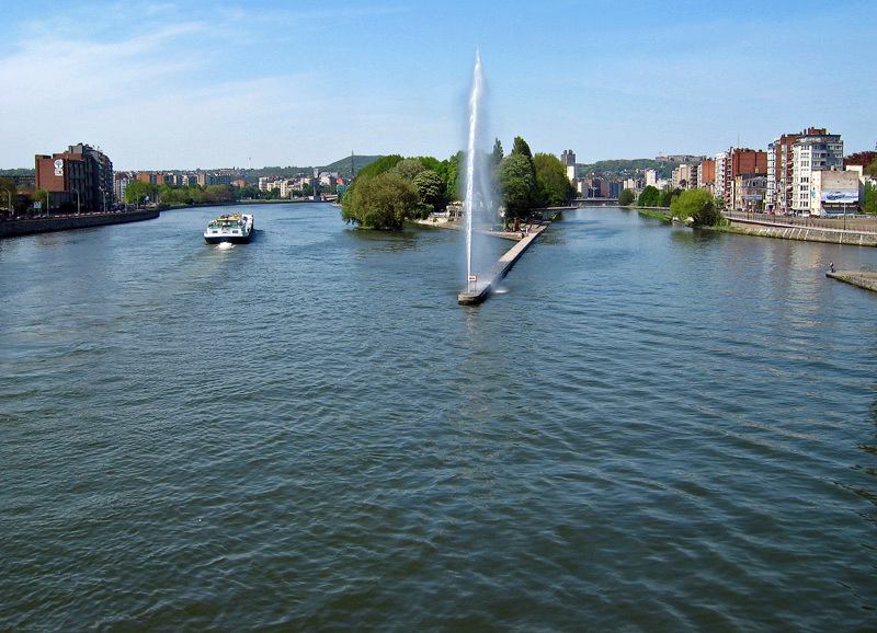 Meuse river from a bridge of Liège (pont de Fragnée)